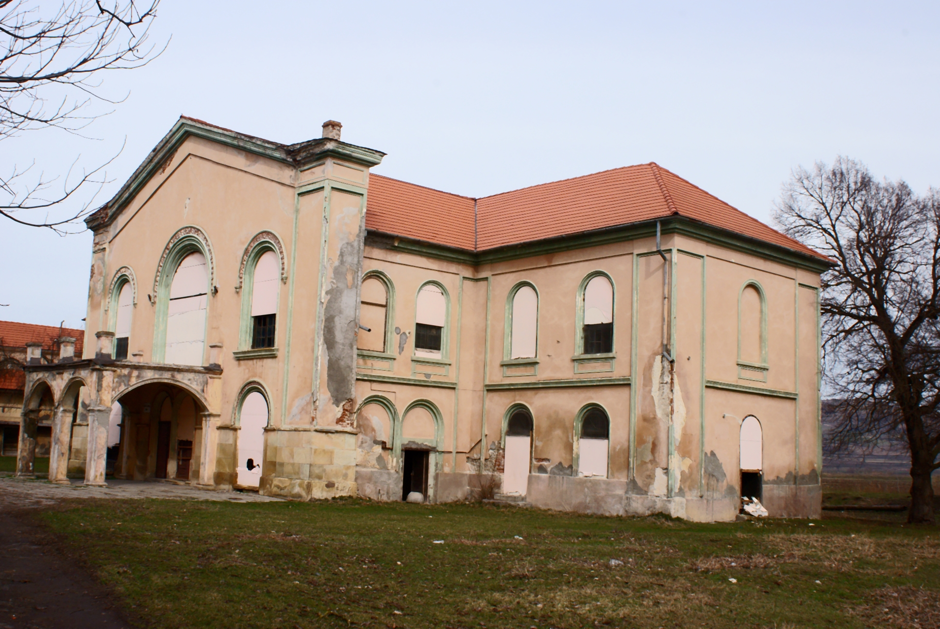 Bonyha, Bethlen kastély